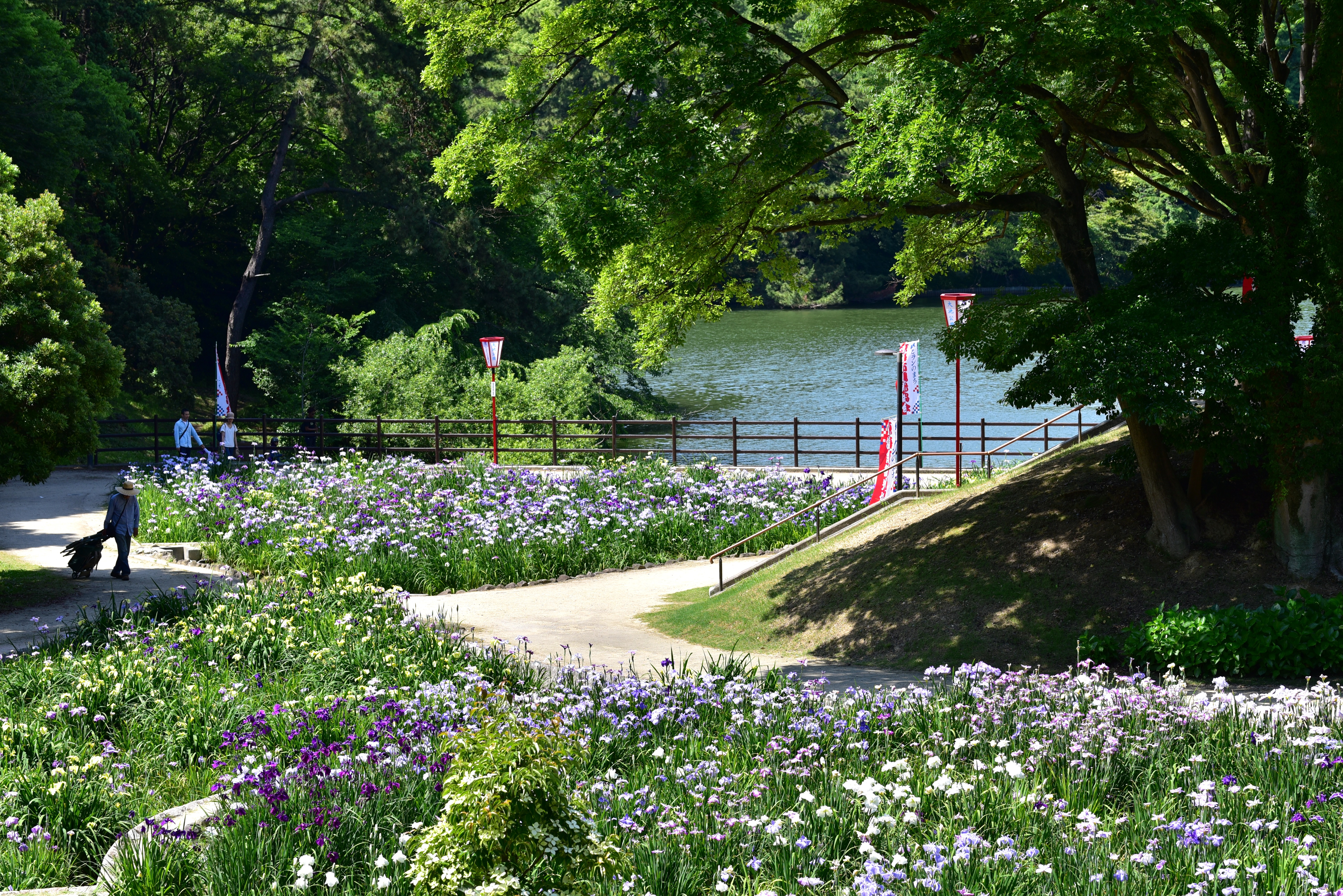 大池公園花しょうぶ園